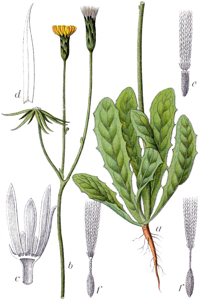 Hypochaeris glabra L. Original Caption Einjähriger Hasenlattich, Hypochoeris glabra